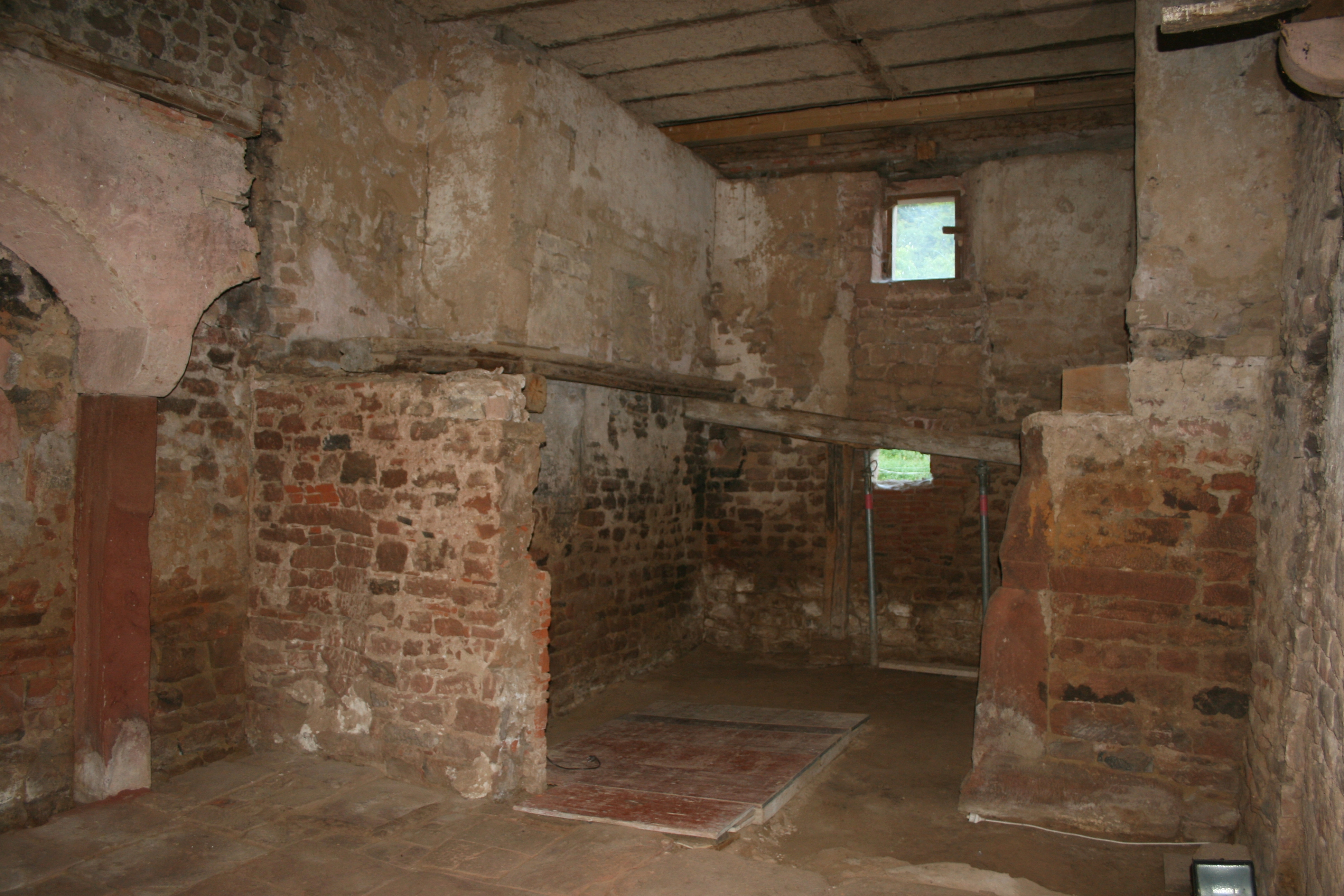 Blick in den Innenraum der Arnheider Kapelle bei Breuberg.